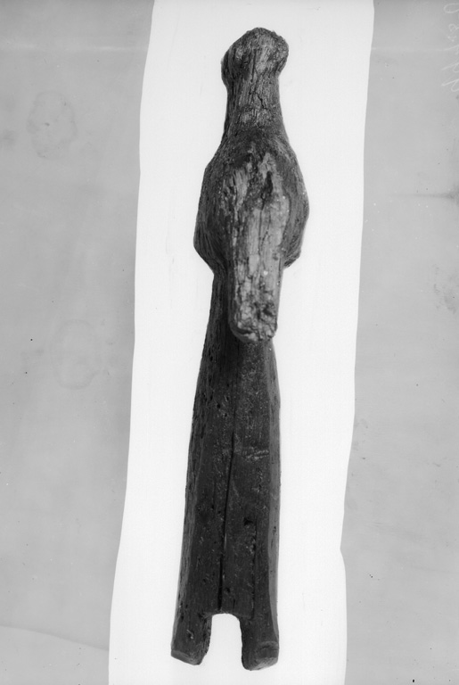 Träkil sedd från sidan. Motiv: Alvastra pålbyggnad Nyckelord: Riksintressen Kategori: Arkeologiskt material, Boplats Träkil sedd från sidan.